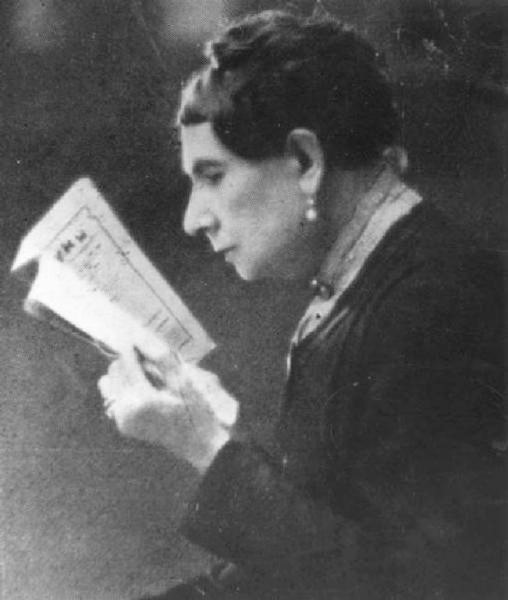 Rachele Botti Binda